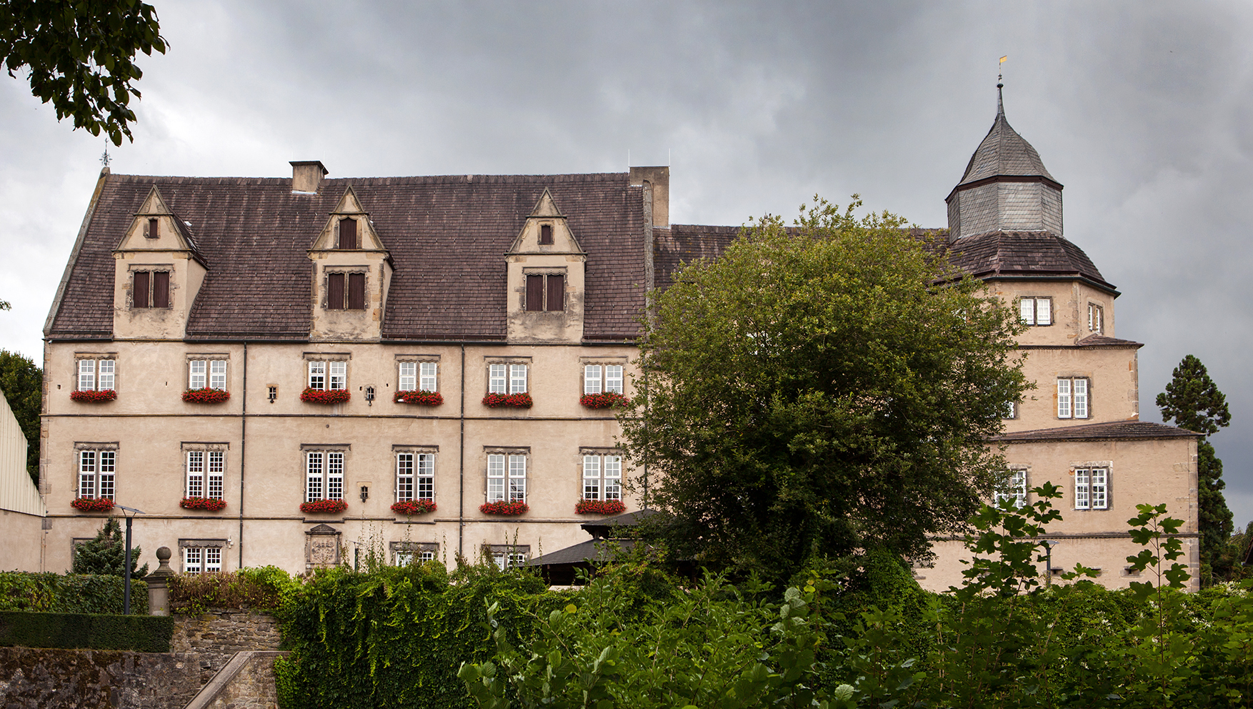 Schloss Varenholz, Ostseite This is the photograph of an architectural monument. It is part of the list of cultural monuments of Kalletal, no. 1